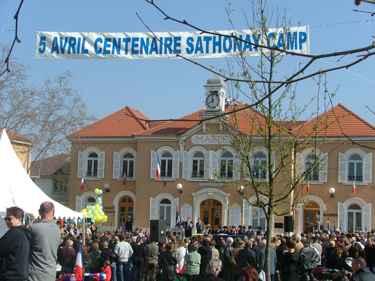 Celabration 100 ans de Sathonay-Camp